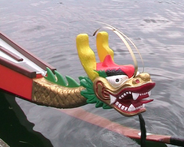 mueritzsail_drachenkopf